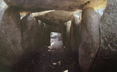 Vista interior del dolmen de la Cova d'en Daina, Romanyà de la Selva, Girona. Se aprecian los imponentes "ortostatos" en su construcción. IV-III milenio antes de Cristo.